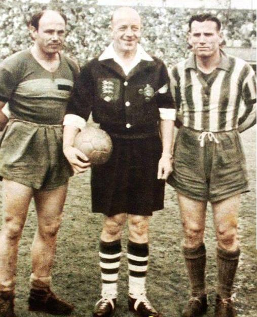 Alfredo Fógel junto al jugador de Boca Natalio Pescia y el árbitro Harry Hartles.